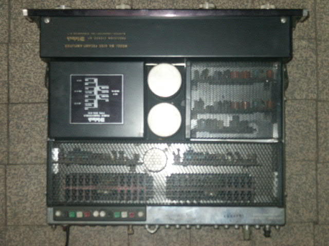 MA6100, Detailbild